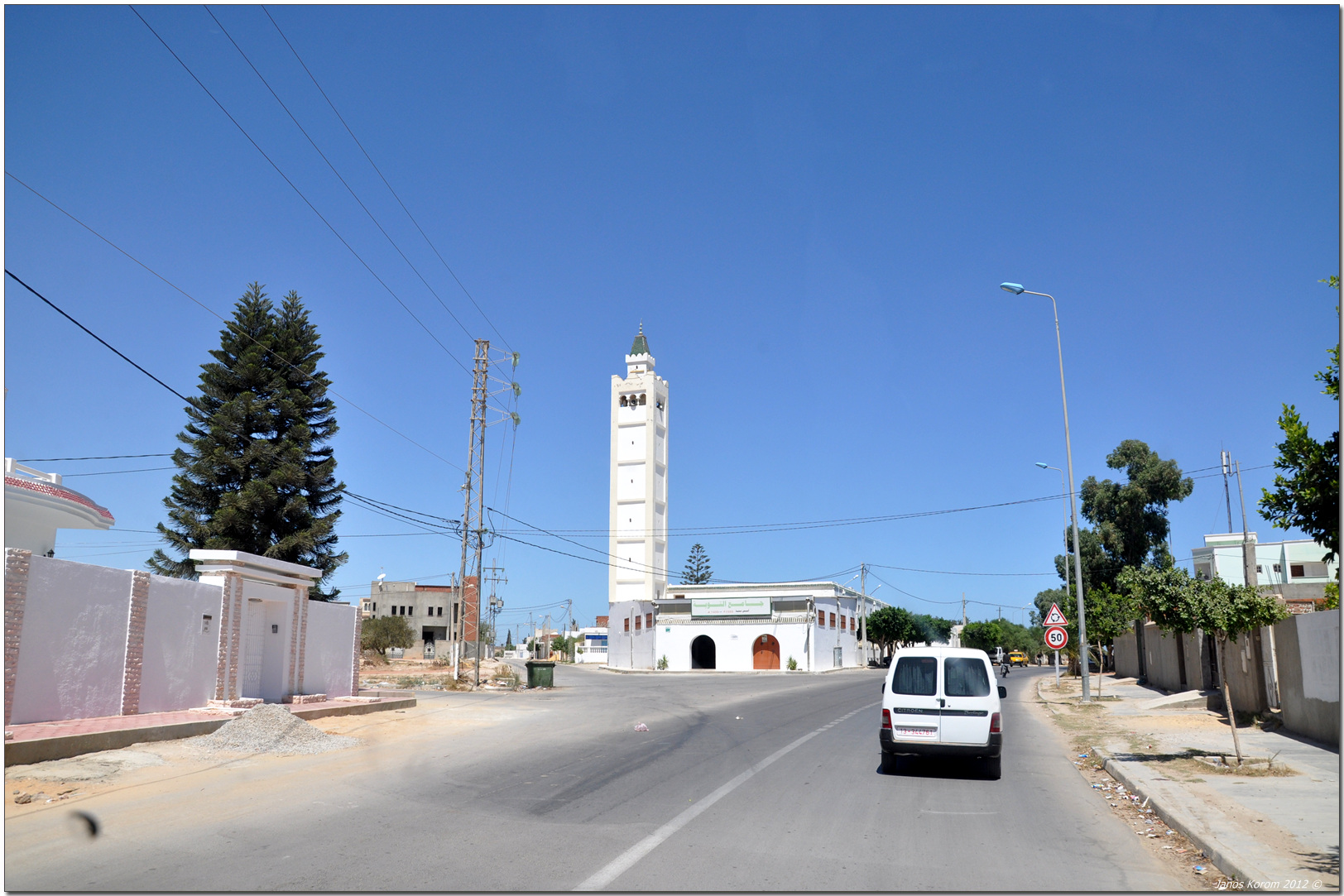 Vue d'une rue de Kalaa Sghira, en Tunisie.